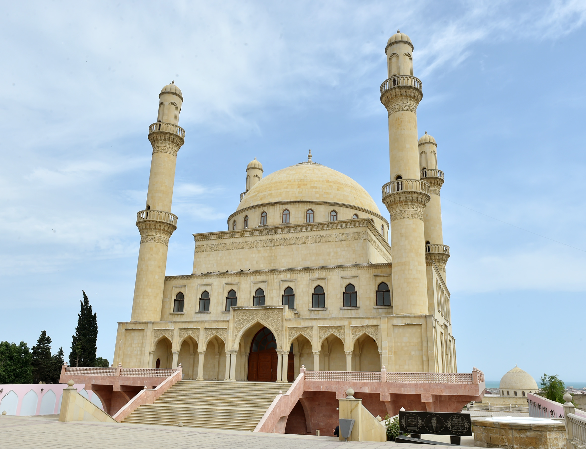 Rəhimə xanım məscidi